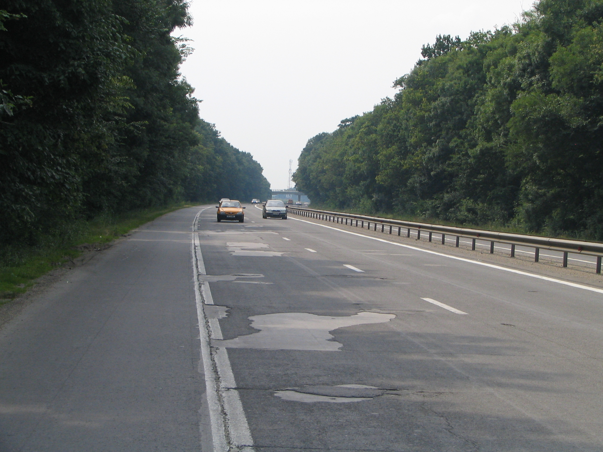 eh... :-)